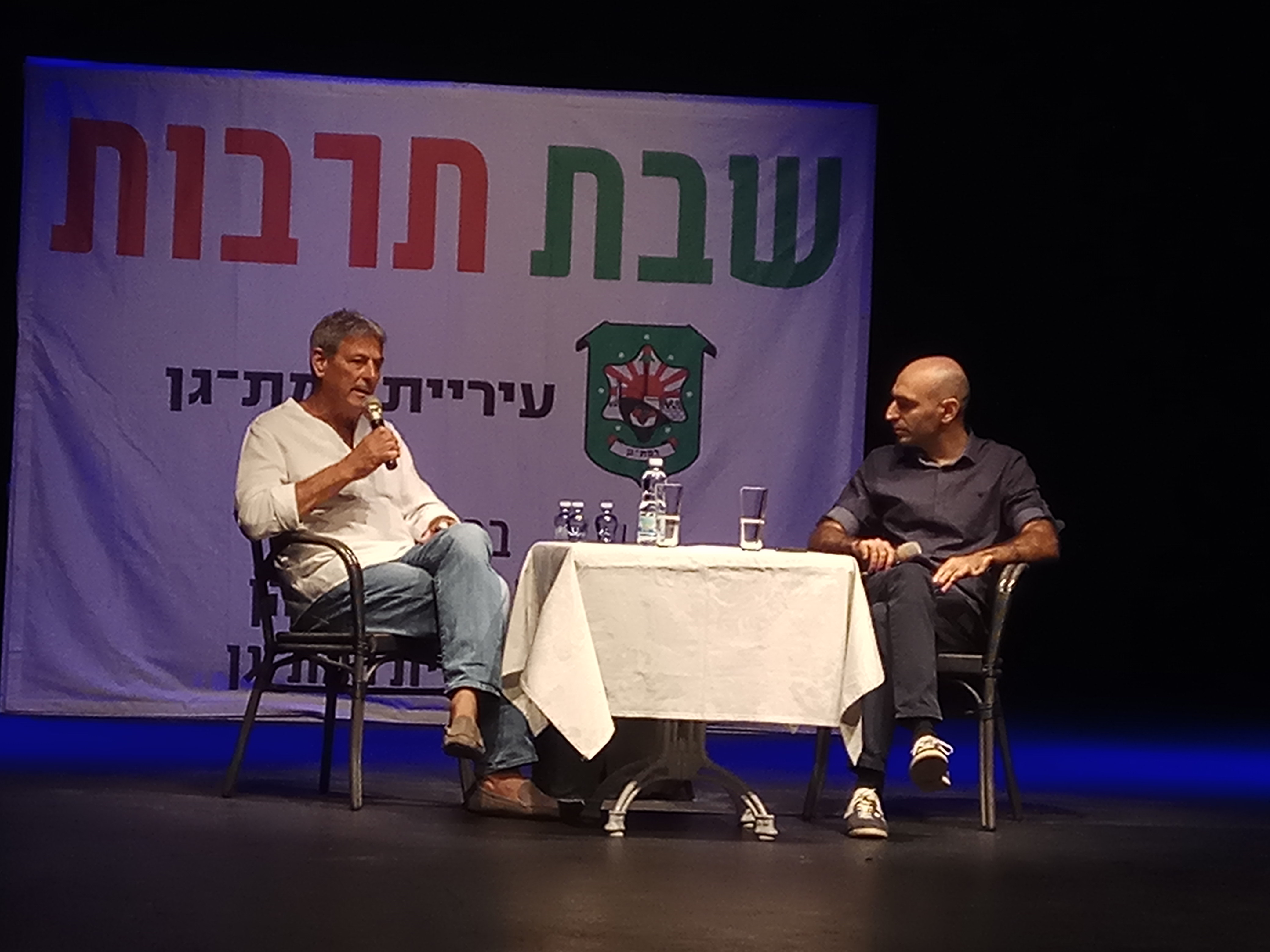 ח"כ רם בן ברק באירוע שבתרבות ברמת גן עם אסף ליברמן